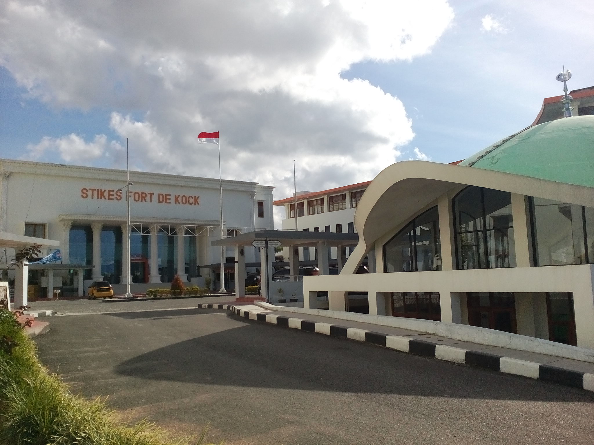 STIKES FdK musala